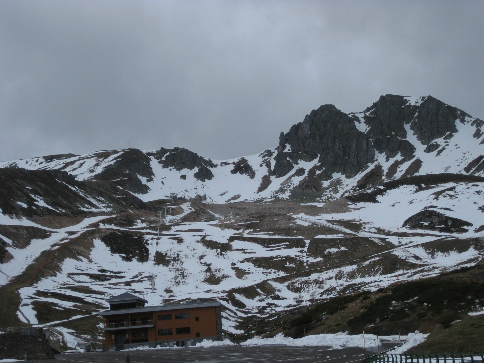 Vista del Circo de Cebolledo, en la estación de esquí de San Isidro (León), con las primeras nieves de otoño.